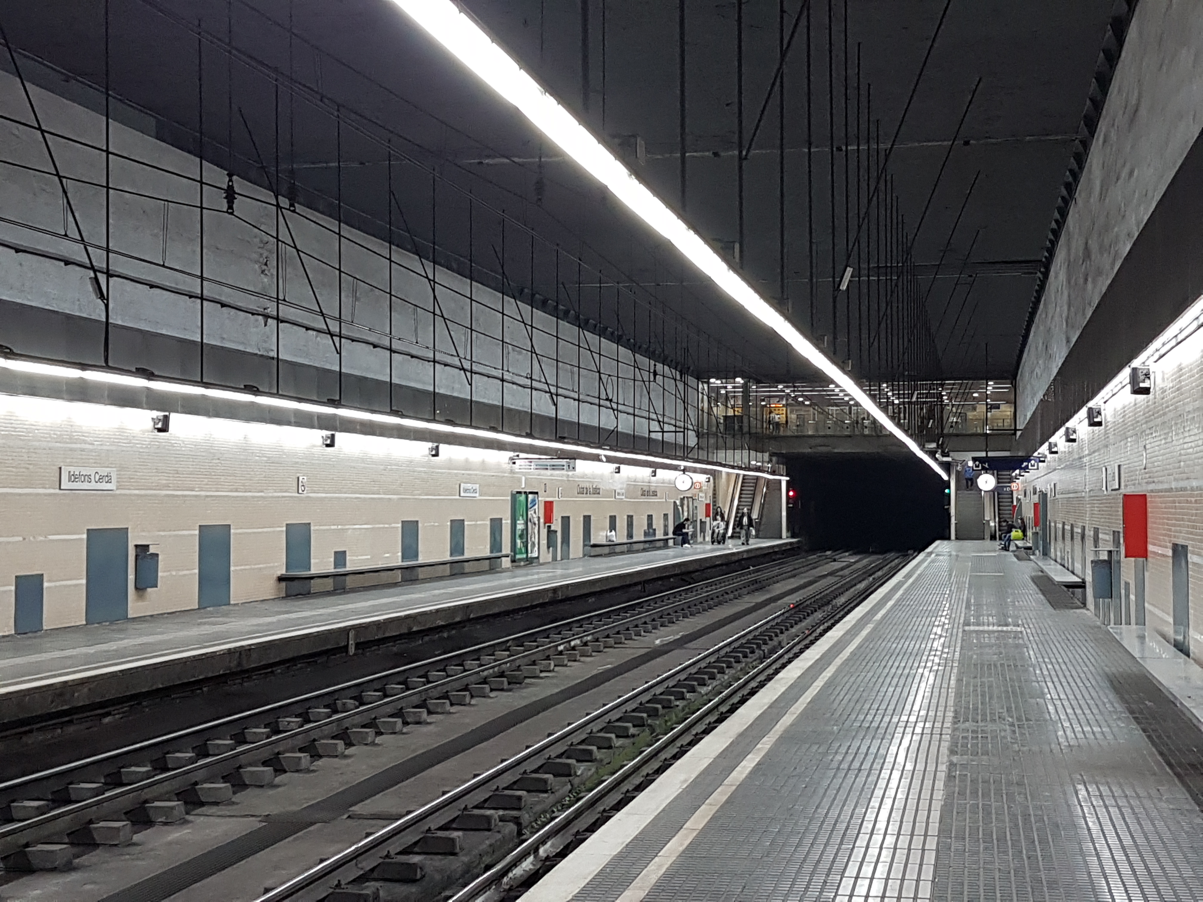 Vista general de l'estació